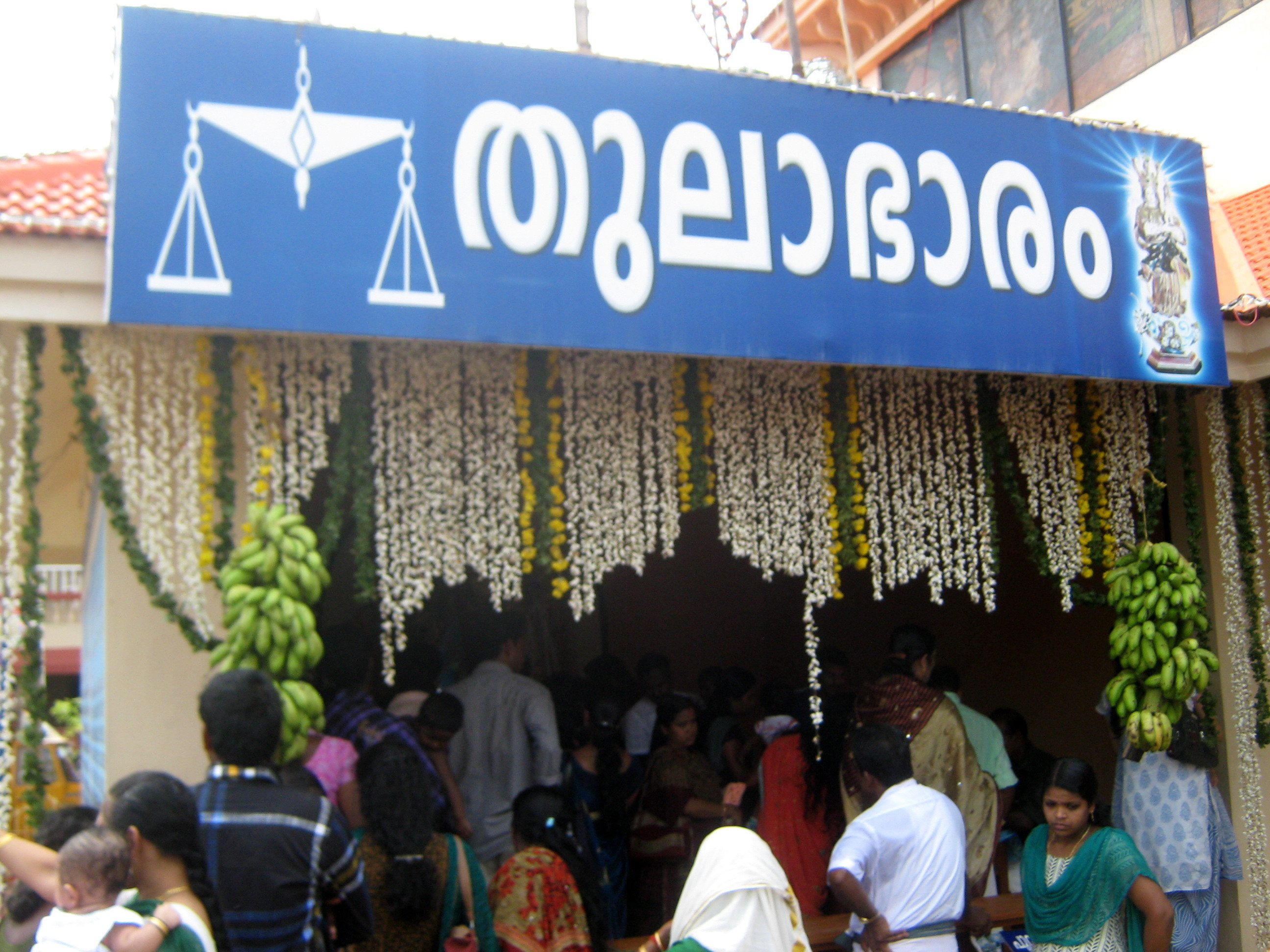 കൊരട്ടിമുത്തി തിരുനാള്‍ 2012